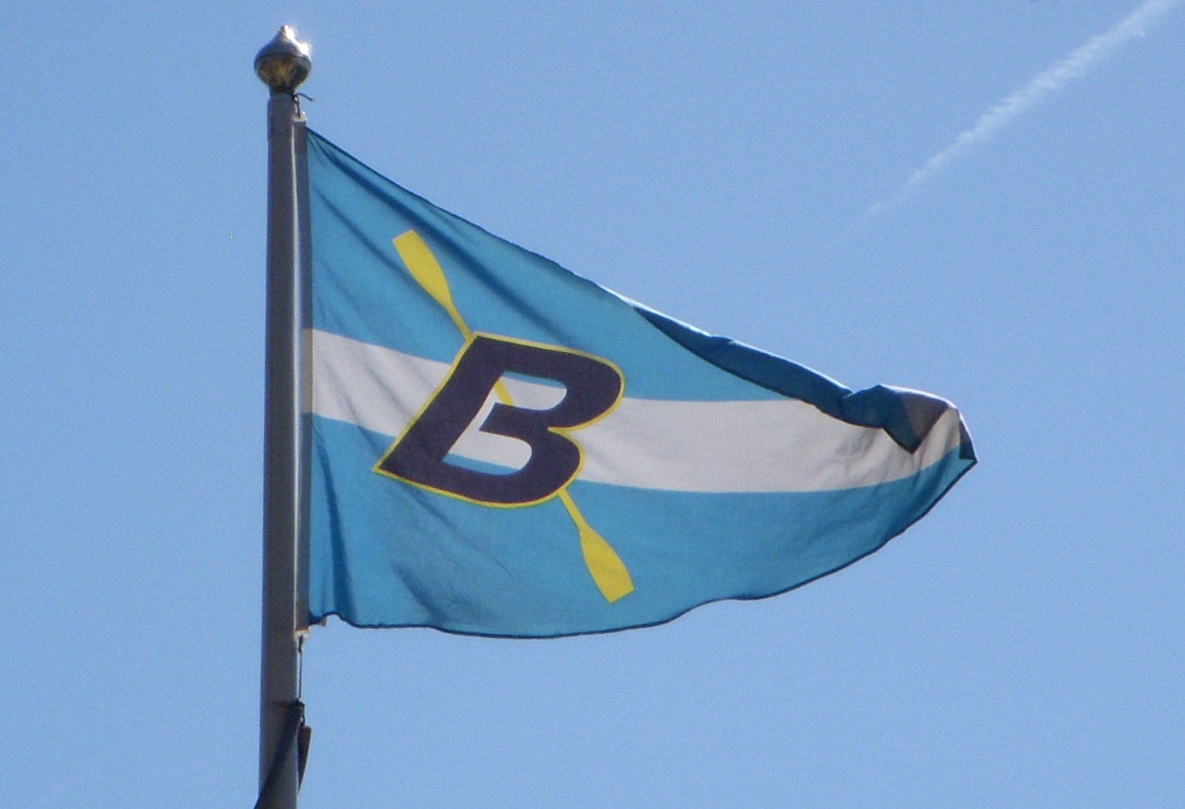 Brunnsvikens Kanotklubb, flagga